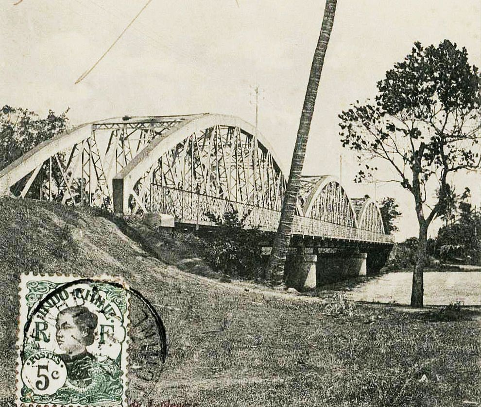 Cầu Rạch Cát ở Biên Hòa vào đầu thế kỉ 20